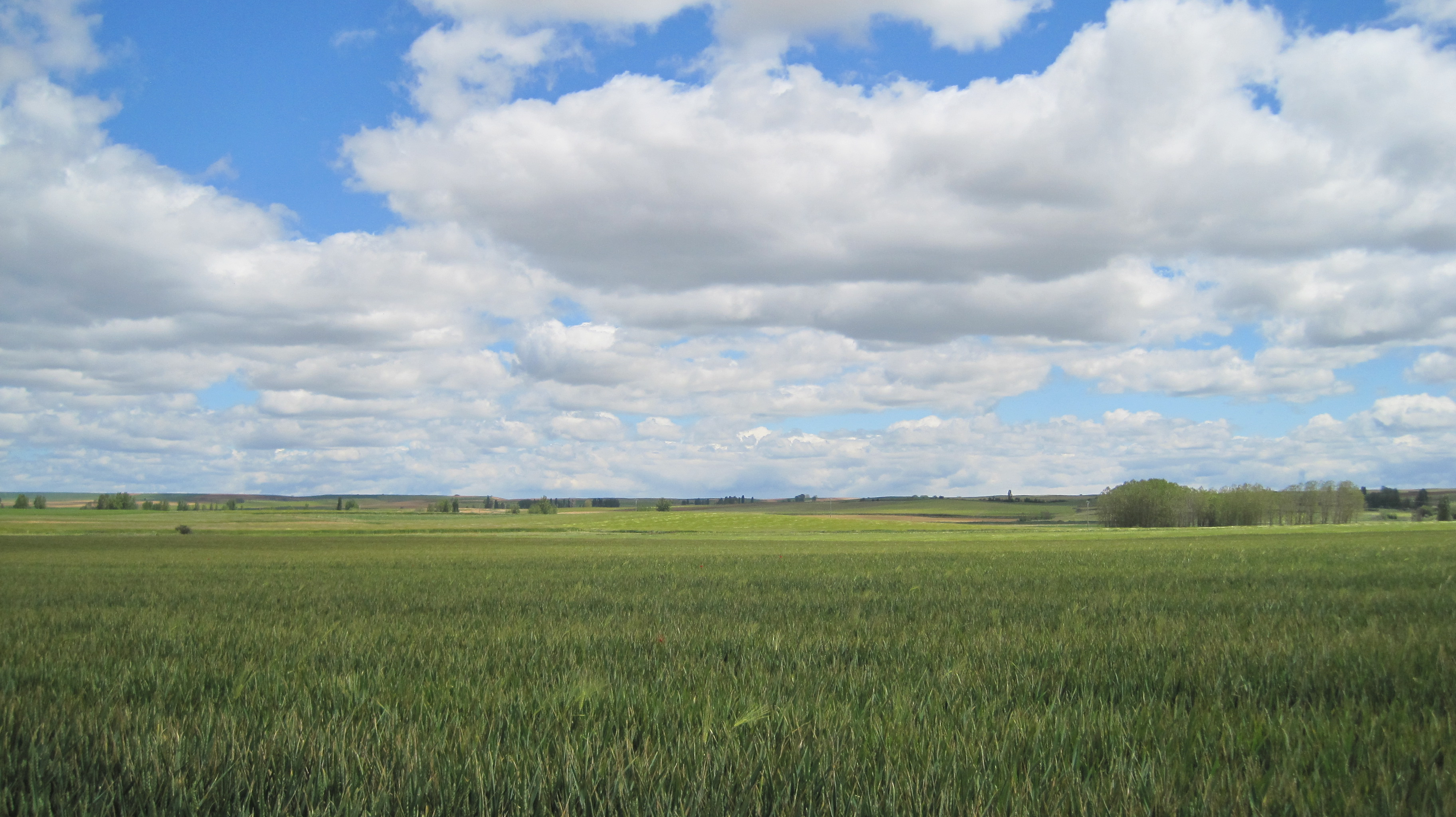 Campos de cultivo en San Román de la Cuba (Palencia, España).